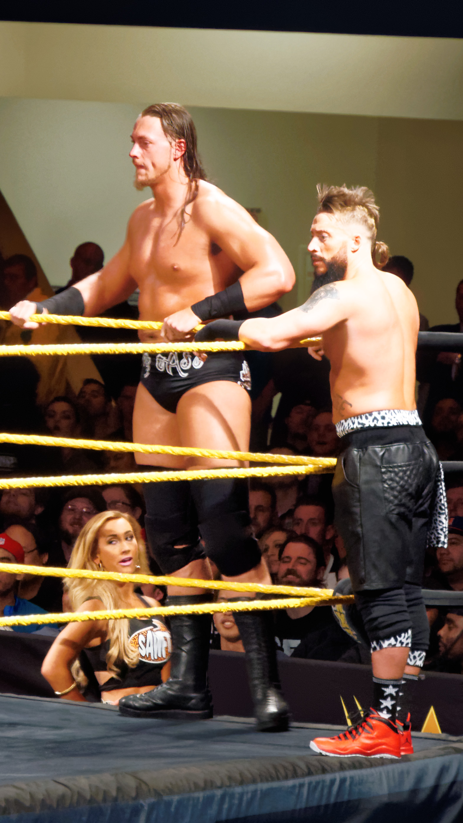 2015-03-27_23-59-31_ILCE-6000_3771_DxO